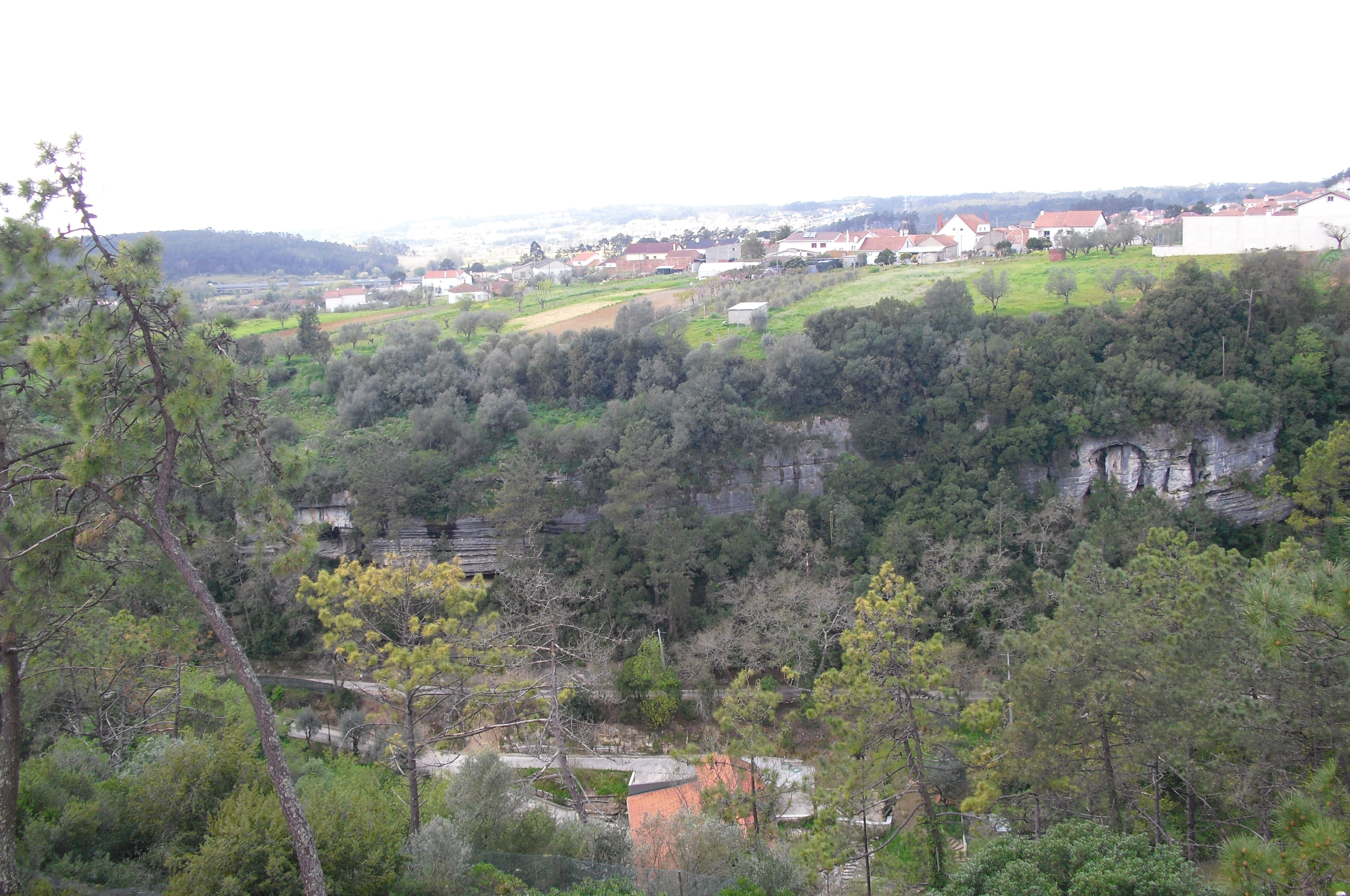 O vale do Lapedo, visto da cota do Centro de Interpretação do Abrigo do Lagar Velho